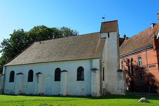 Kościół Św. Jerzego w Darłowie